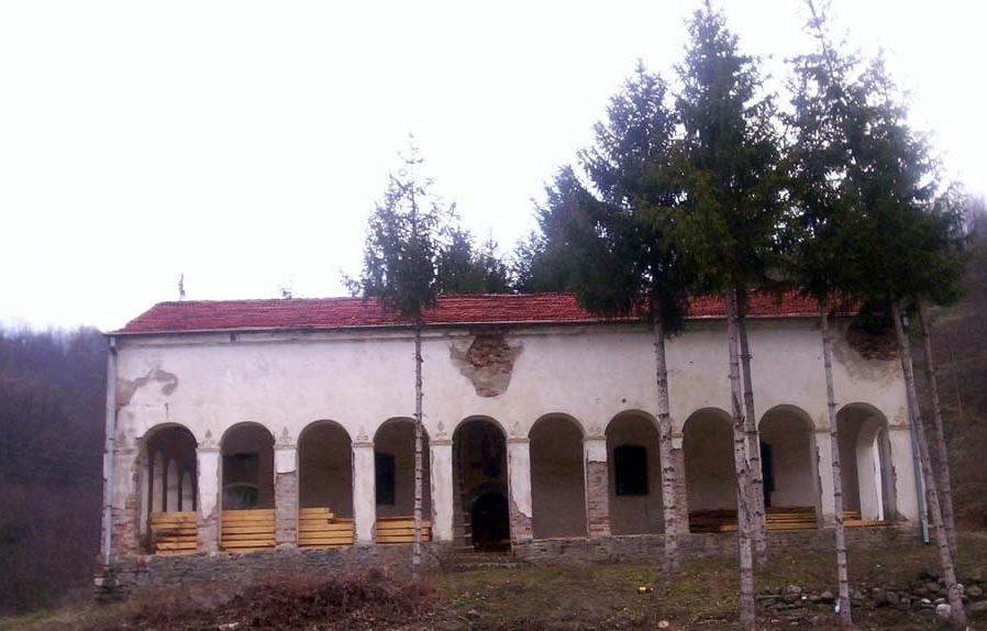 Православна црква у Крушевици, општина Власотинце.